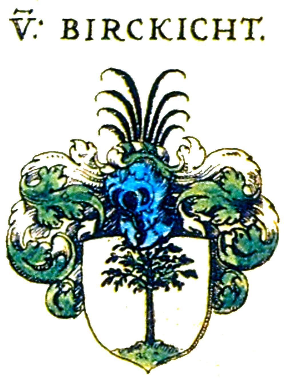 Wappen meißnischer Uradel Birckicht, Siebmacher New Wappenbuch 1605